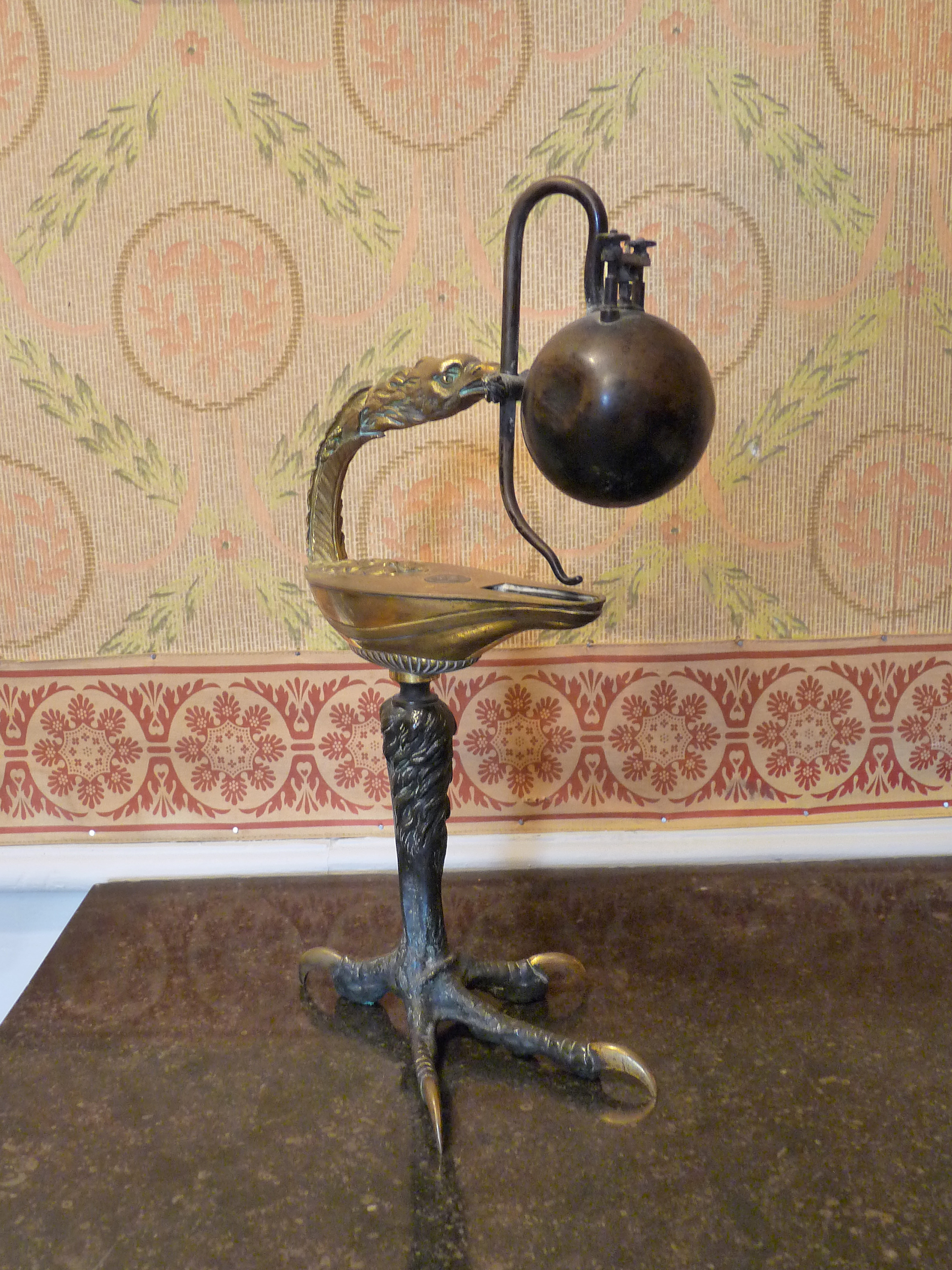 Remiremont, Musée Charles Friry : lampe docimastique, inventée par Théodore-Pierre Bertin (1751-1819)